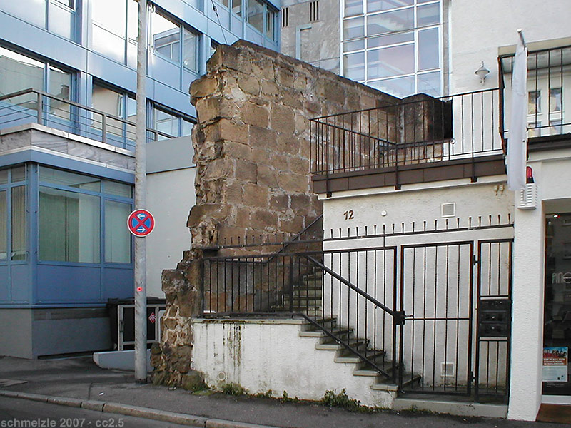 Mauerrest des ehemaligen Klaraklosters in Heilbronn, Siebeneichgasse 12, Ecke Klarastraße